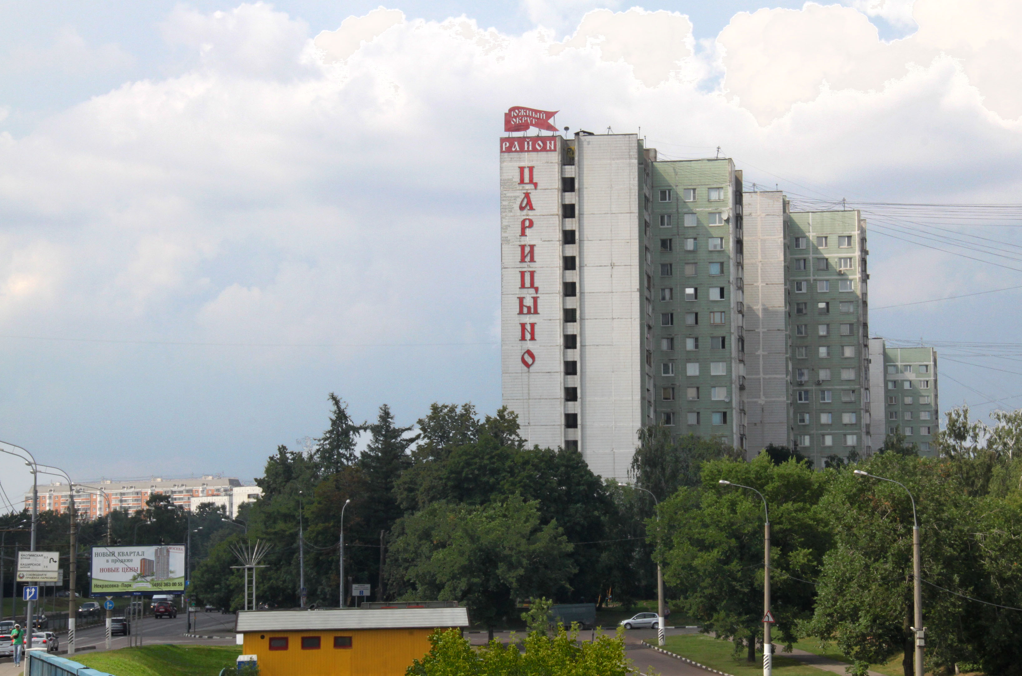 Въезд в район Царицыно со стороны Липецкой улицы